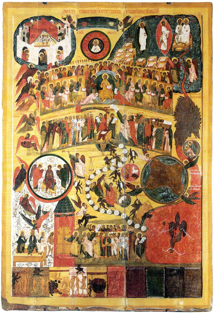 Икона Страшный суд, 16 век